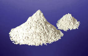 Aluminium Nitride powder氮化鋁粉末